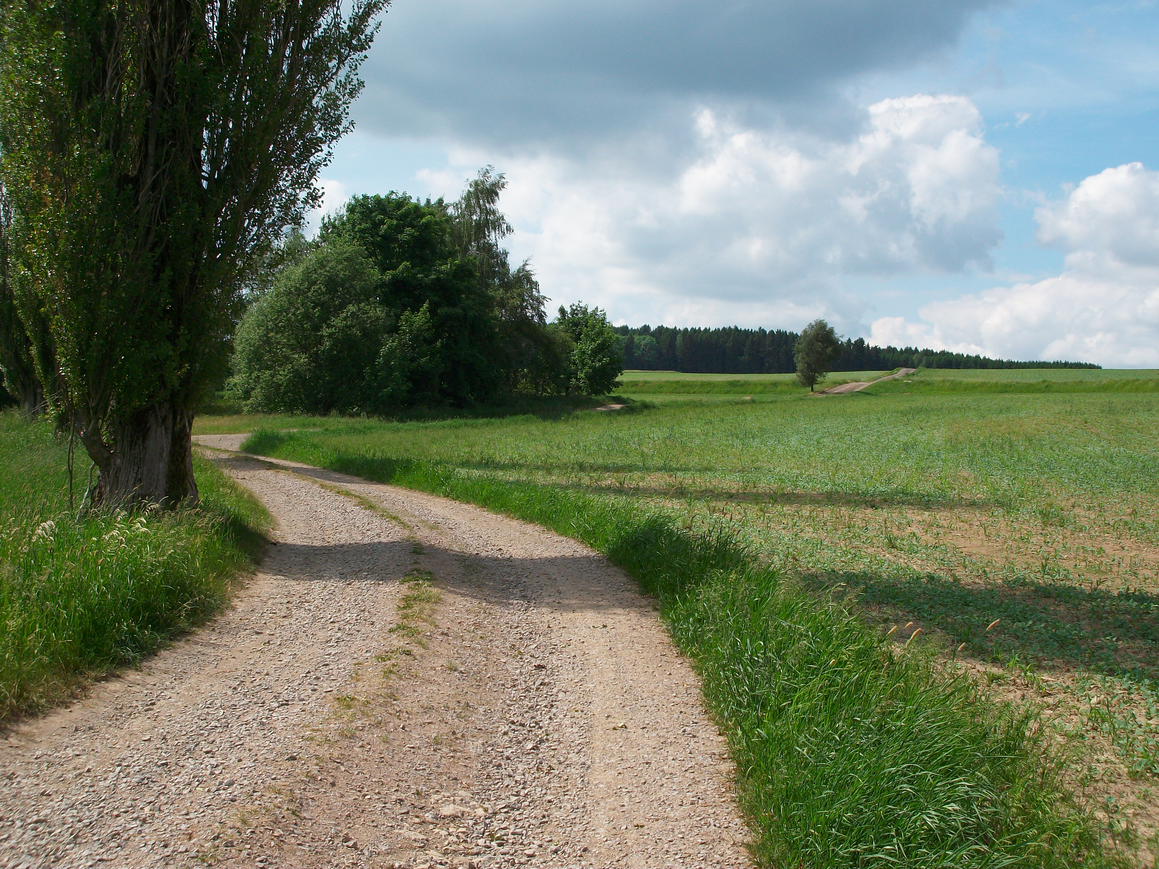 Ehemaliger Standort des Haltepunkts Müdisdorf (2017)